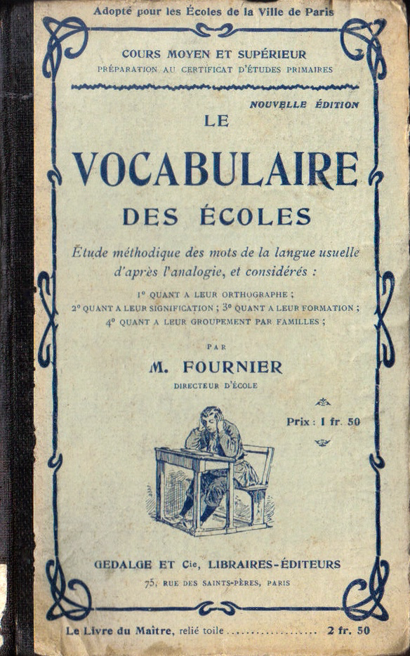 Mathieu Fournier, Le vocabulaire des écoles, première édition en 1905.